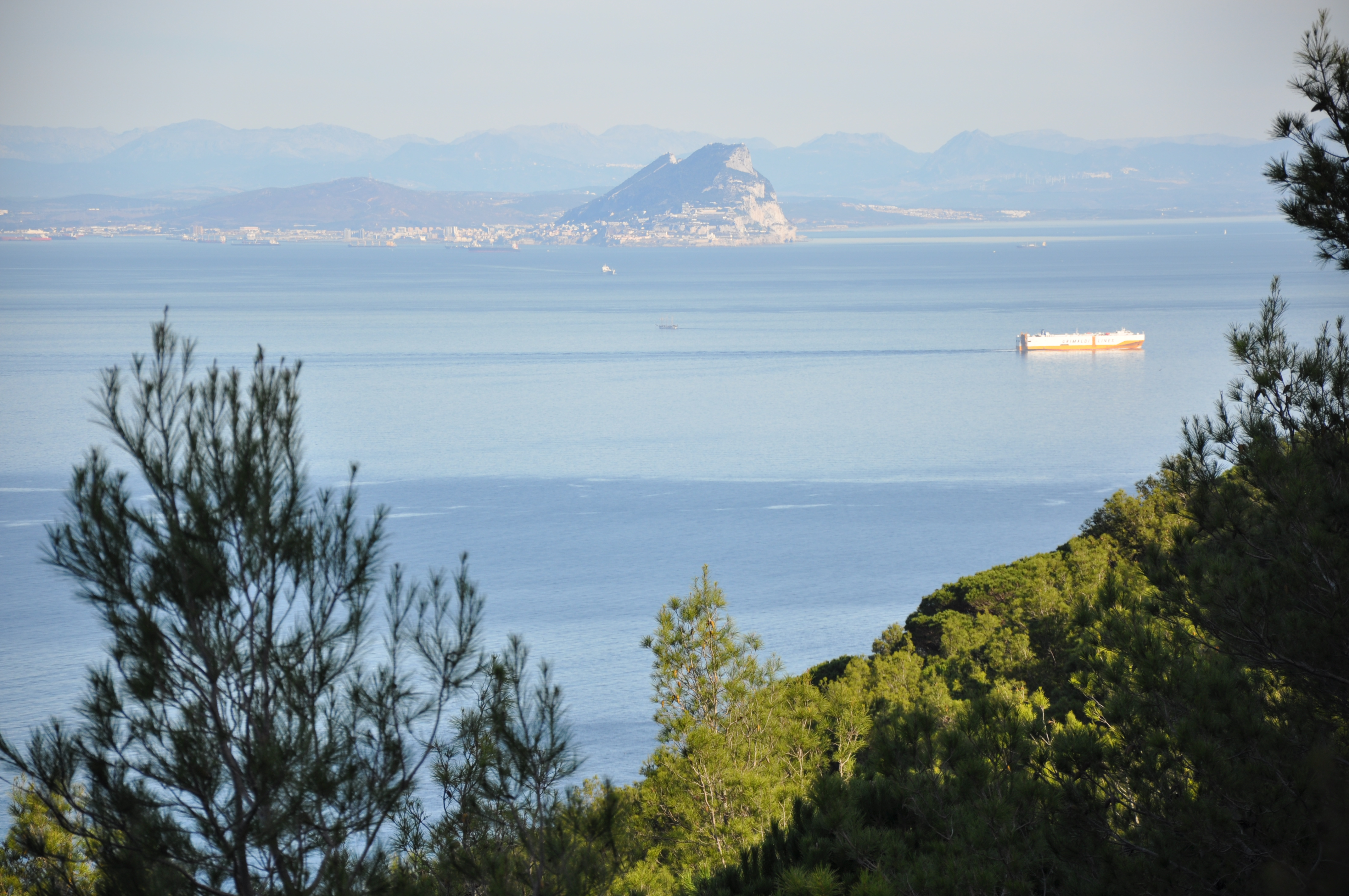 Estrecho de Gibraltar desde Ceuta, España.